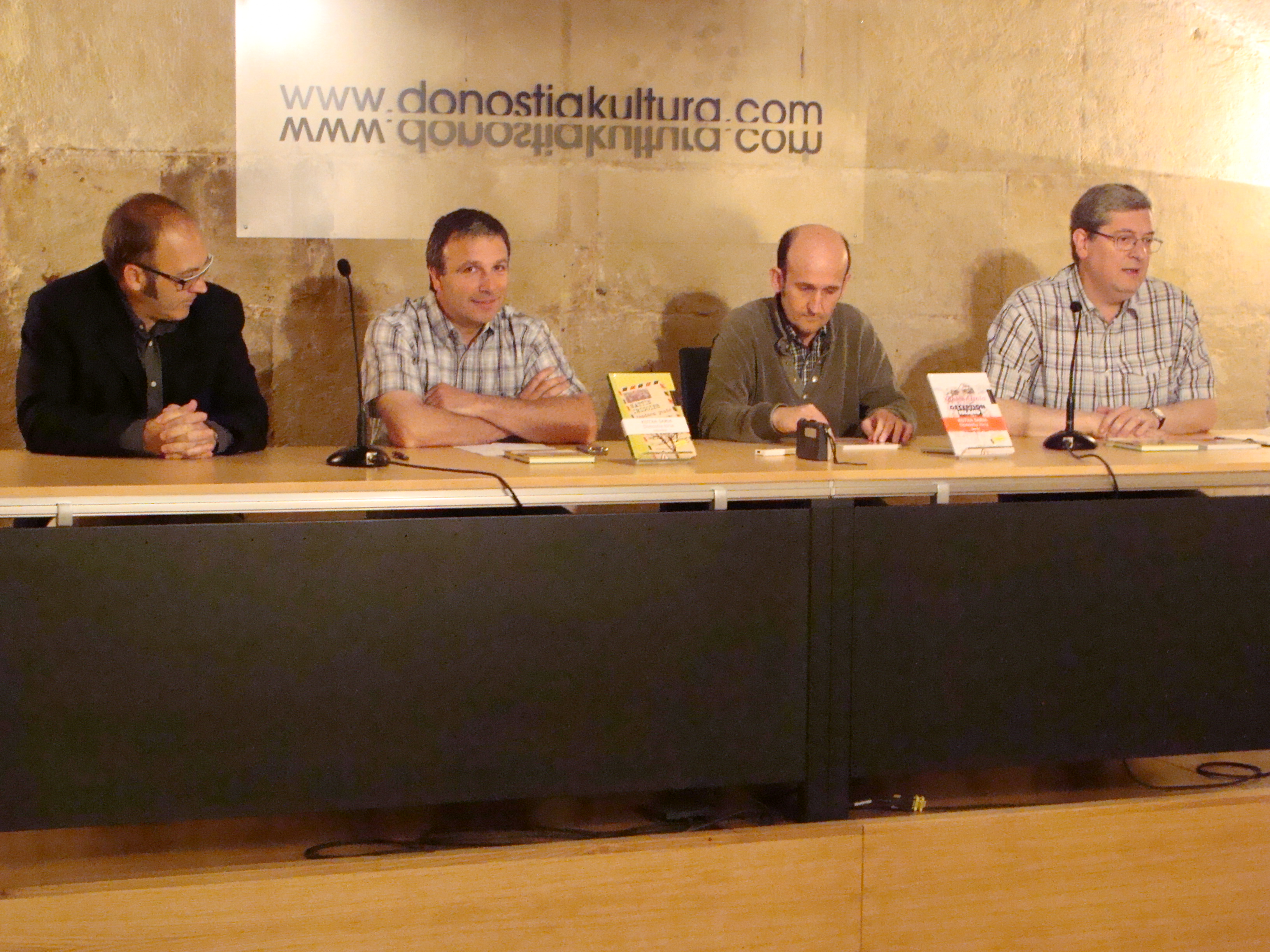 Kutxa Literatur Sariak 2010: Jendeen jende (Mattin Irigoien), Deception islan (Xabier Artola).